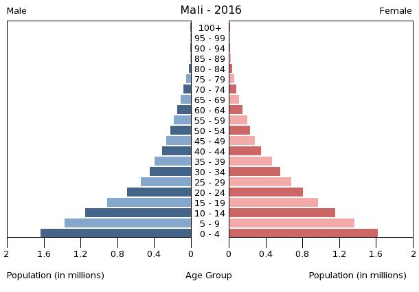 A population pyramid illustrates the age and sex structure of a country's population and may provide insights about political and social stability, as well as economic development. The population is distributed along the horizontal axis, with males shown on the left and females on the right. The male and female populations are broken down into 5-year age groups represented as horizontal bars along the vertical axis, with the youngest age groups at the bottom and the oldest at the top. The shape of the population pyramid gradually evolves over time based on fertility, mortality, and international migration trends.